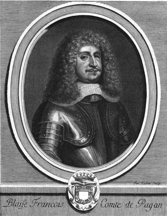 "Blaise François, comte de Pagan."